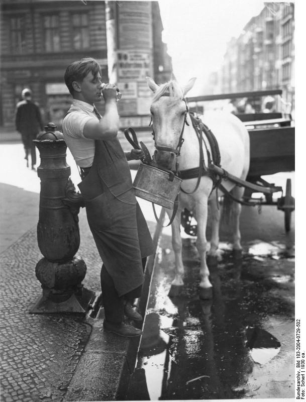 Berlin, Erfrischung für Kutscher und Pferd Haupt-Badesaison. In diesen Wochen herrscht in fast allen Gegenden unserer Seite der Erdkugel hochsommerliches Wetter. Überall drängt sich daher Alt und Jung zum Bad im Freien. Auch Berlin lag in den letzten Tagen im Zentrum einer starken Hitzewelle, die auf Mensch und Tier lastete. Ein nettes Augenblickbildchen aus einer Berliner Vorortstrasse: Fahrer und Pferd erfrischen sich. Photo: Scherls Bilderdienst, Berlin. um 1930